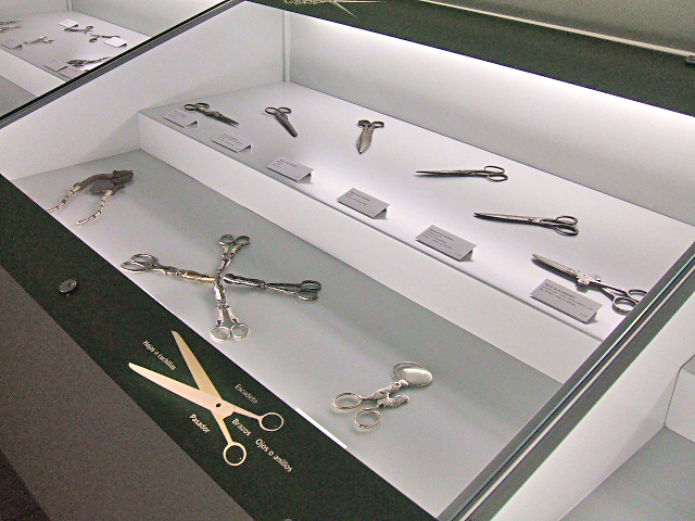 tijeras